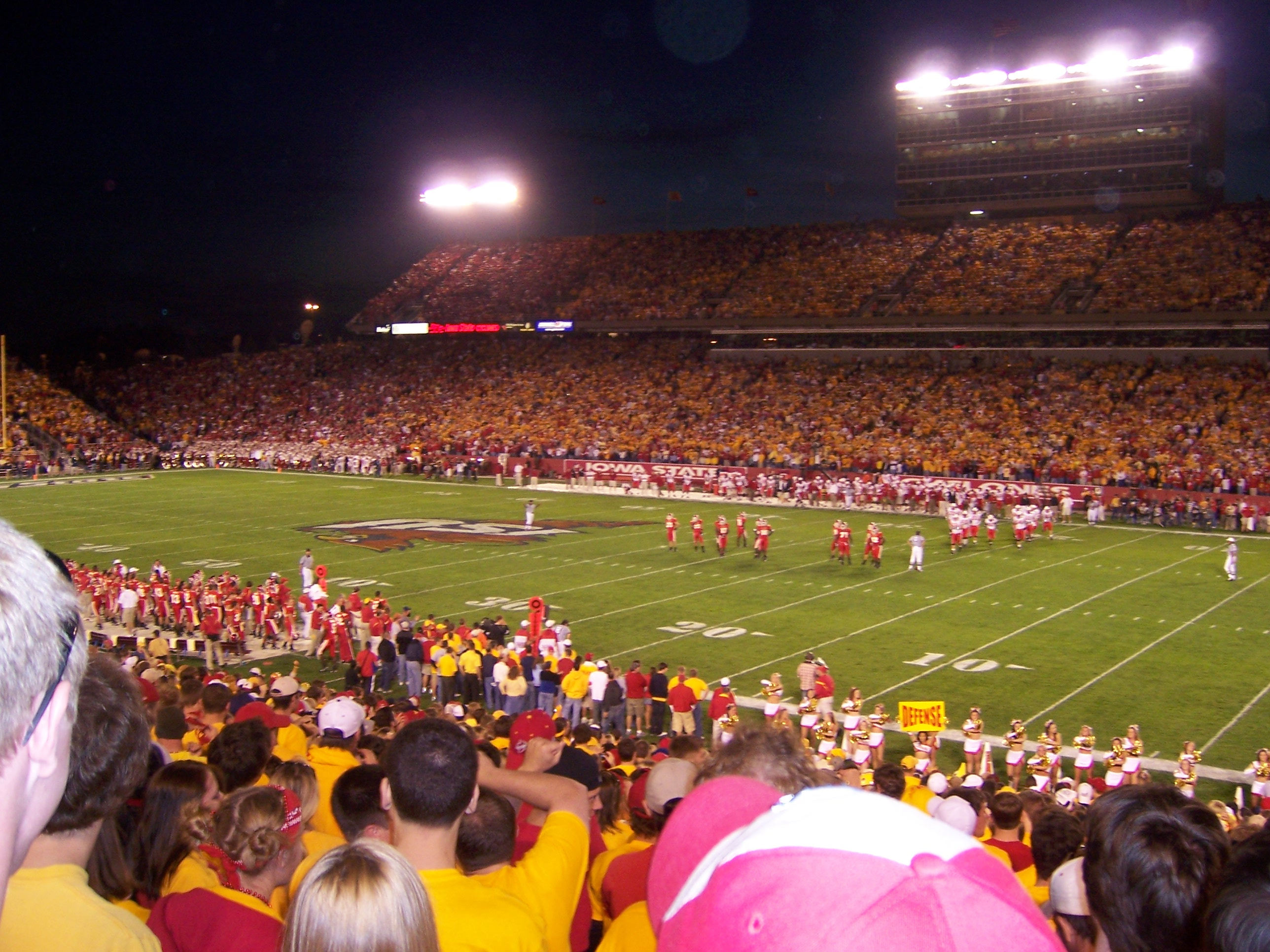 Stadium at ISU